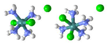 Co(NH3)4Cl3 - představa Alfreda Wernera na konci 19. století